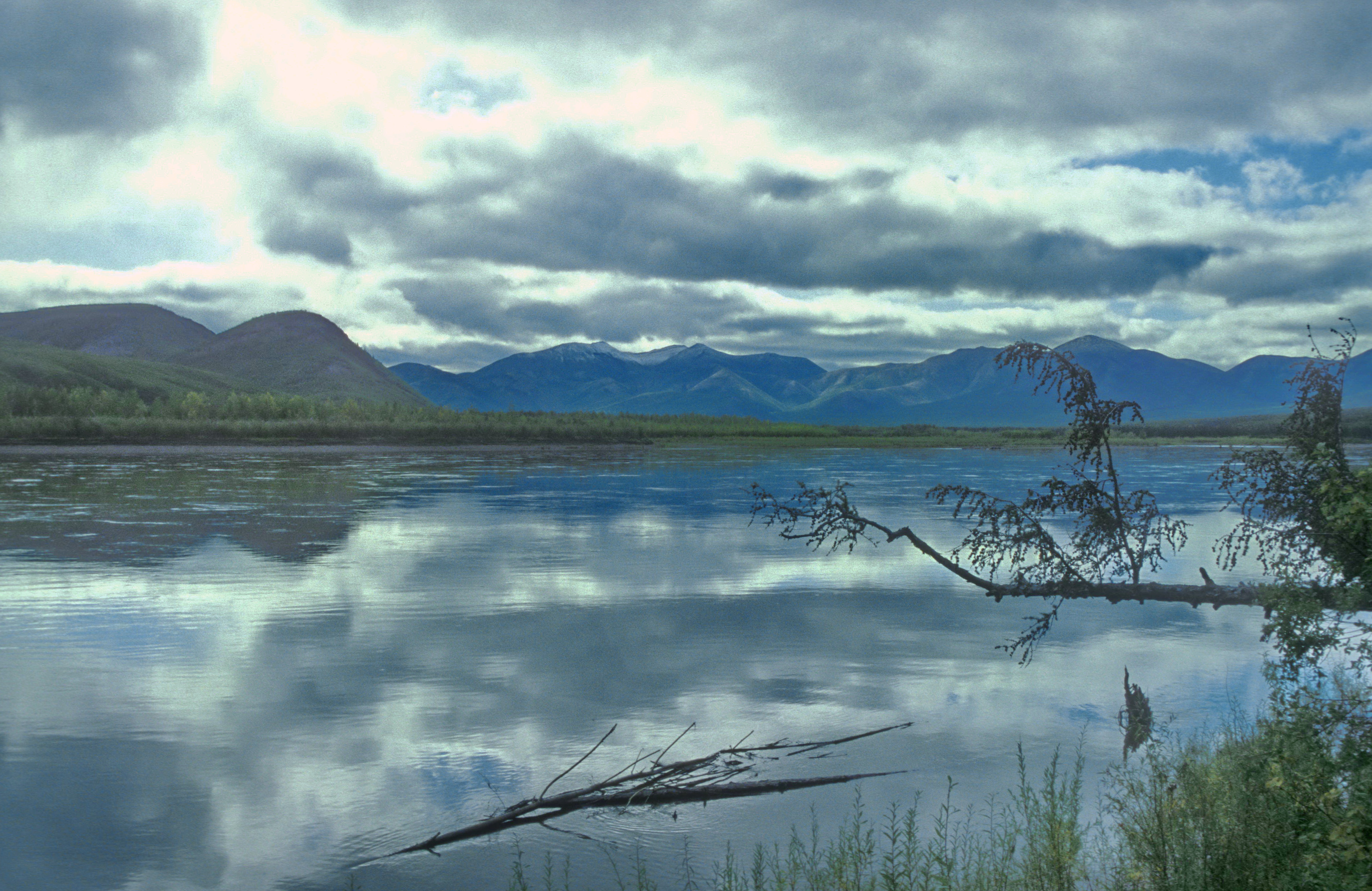 Магаданский заповедник, Ольский район This image is related to the protected area of Russia number 4900024